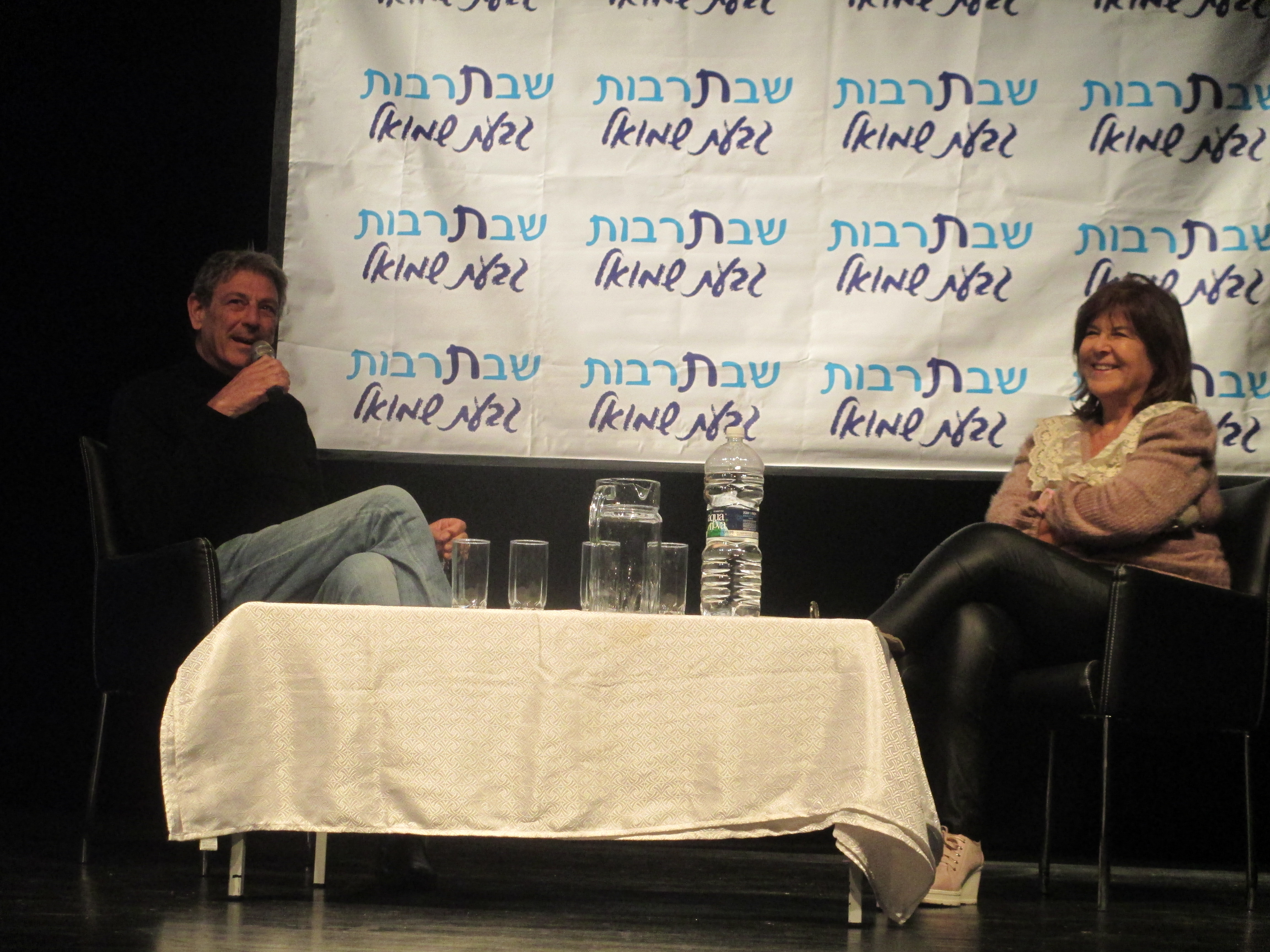 ח"כ רם בן ברק באירוע שבתרבות בגבעת שמואל עם רינה מצליח